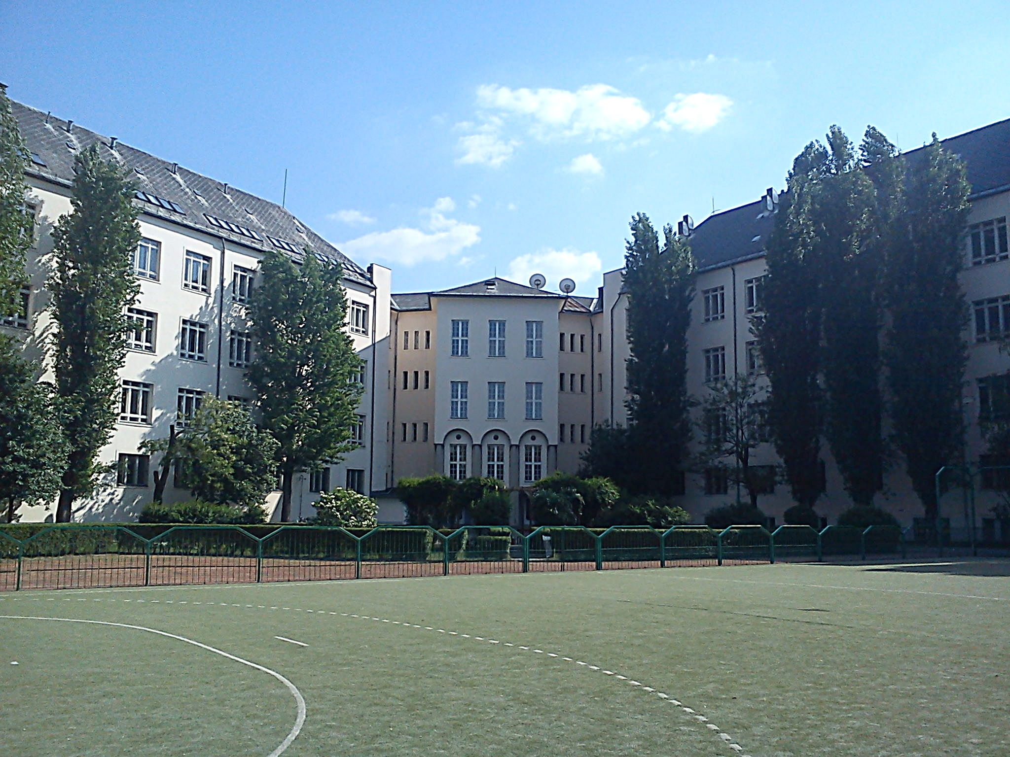 A Szent László Gimnázium udvar felőli nézete (Budapest)